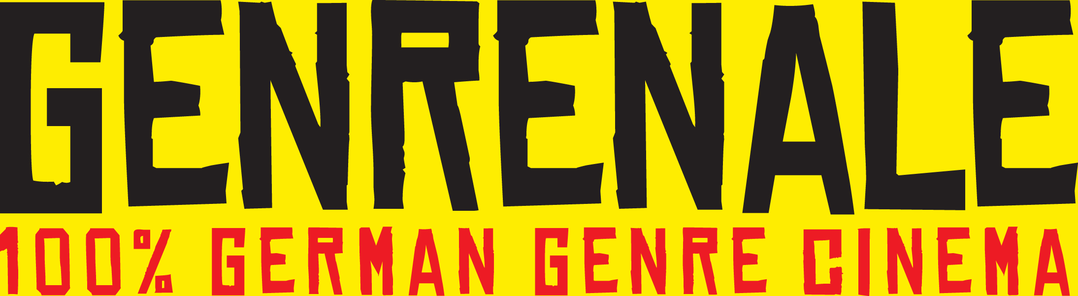 Die GENRENALE Wortmarke auf gelbem Hintergrund